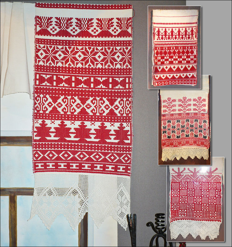 Белгородские рушники. Белгородский музей народной культуры.